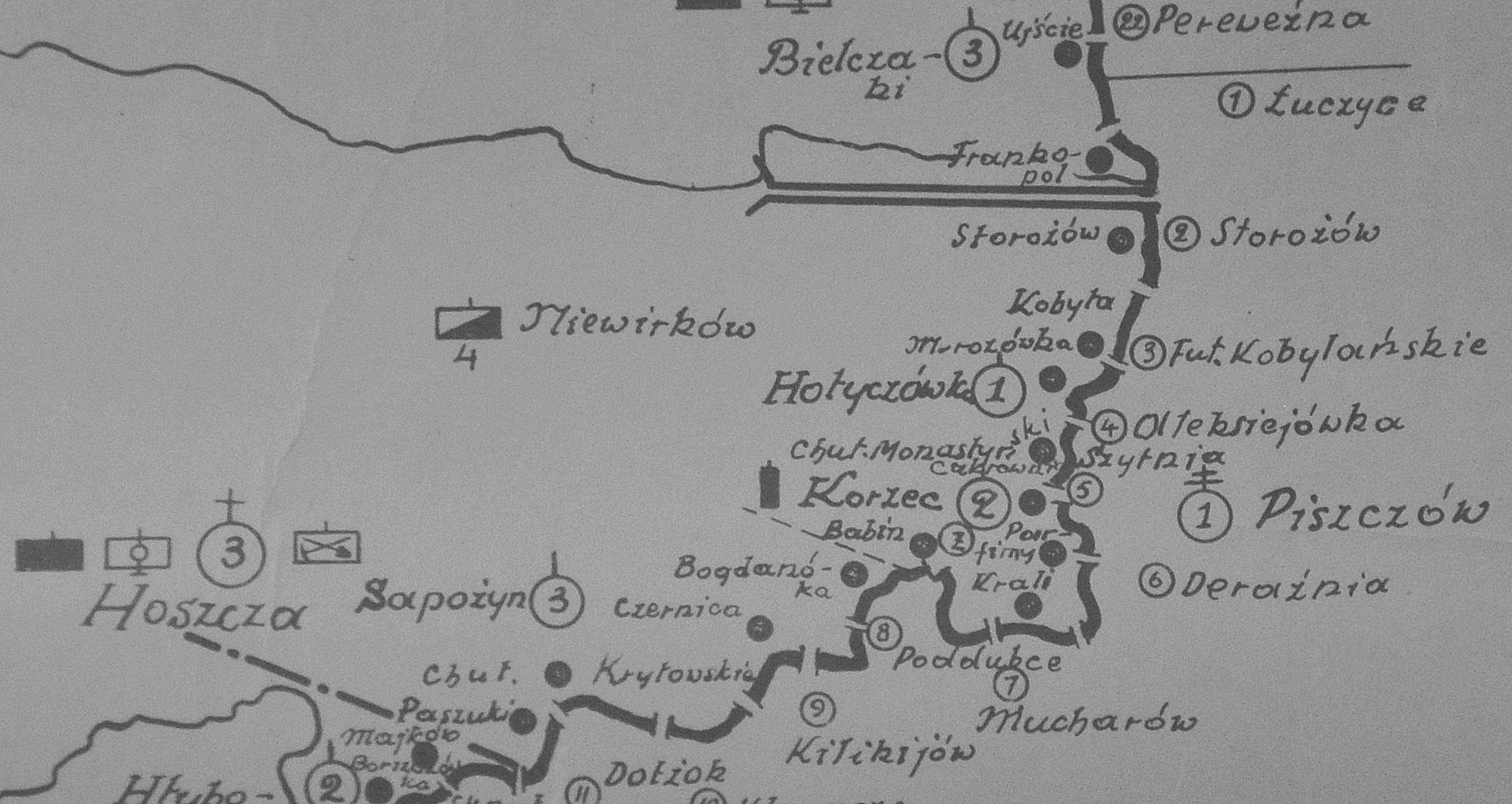 Szkic rozmieszczenia batalionu KOP Hoszcza w 1931